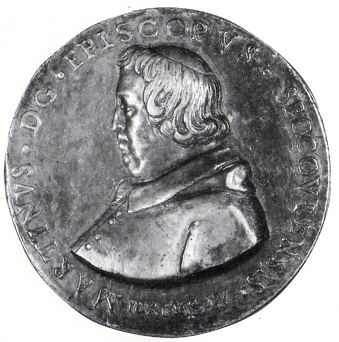 Martin Brenner, Bischof von Seckau (Porträtmedaille, 1612, Giovanni de Pomis) Johanneum Graz